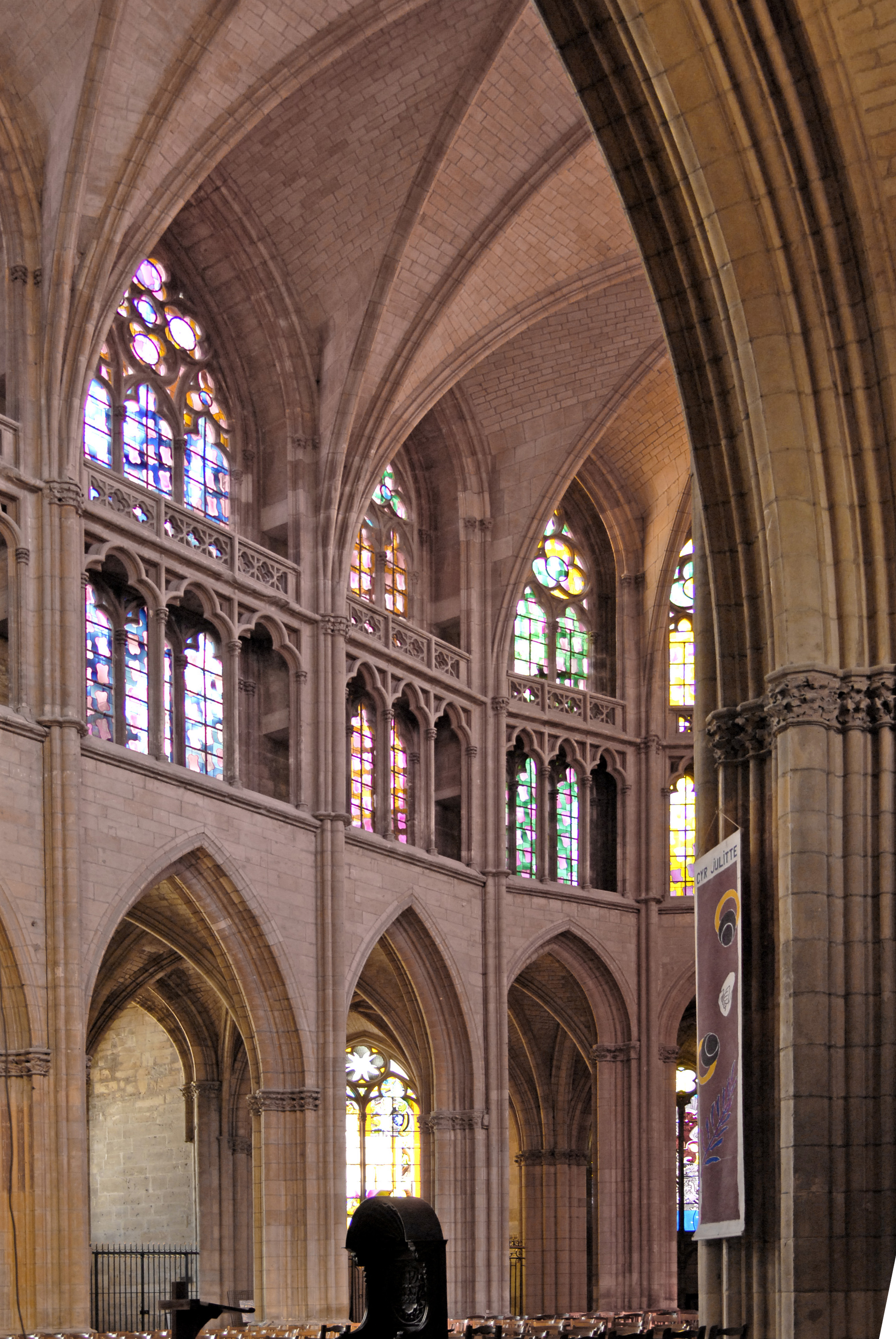 Kathedrale Nevers, Ostchor, Nordwand